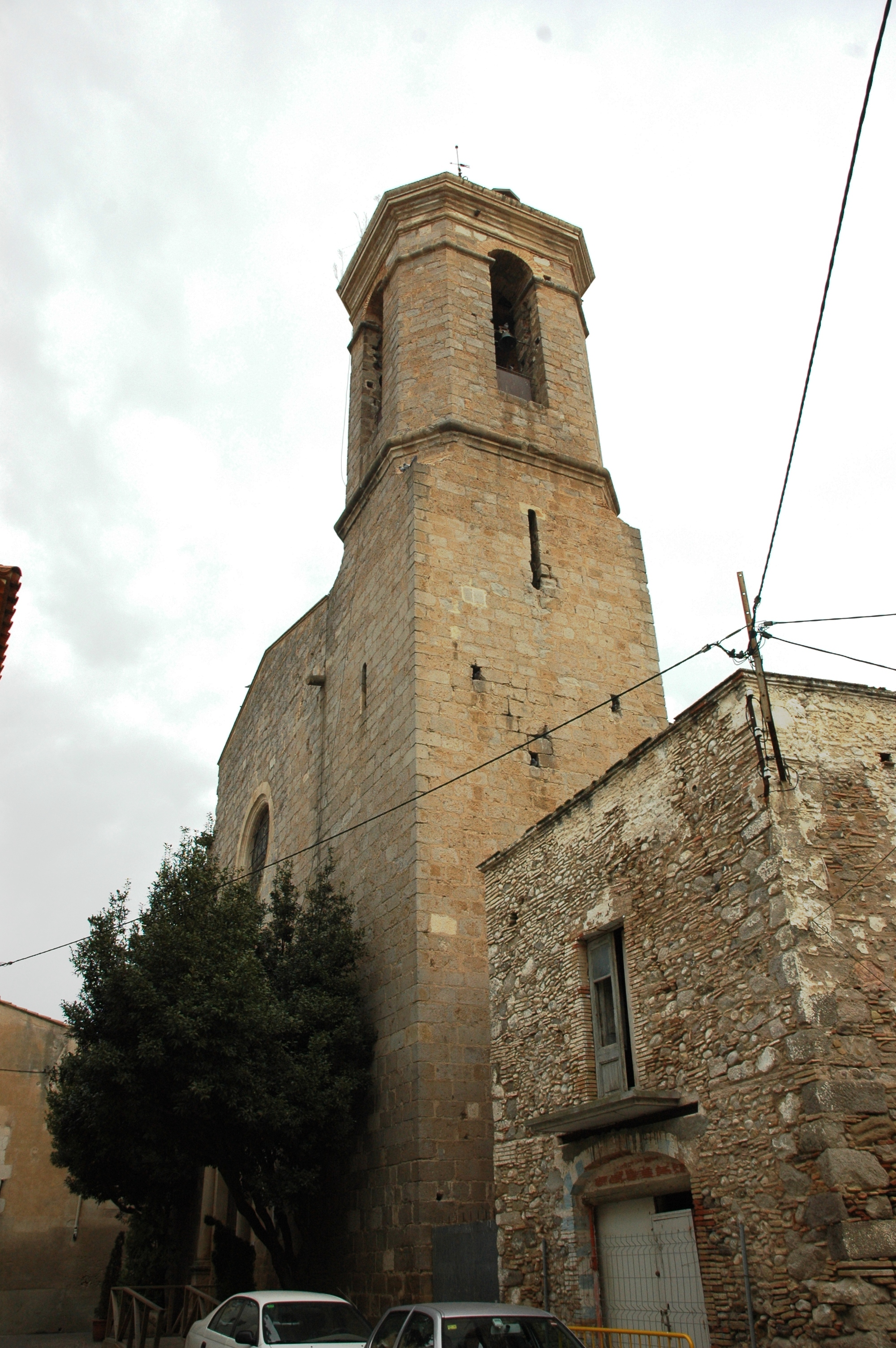 Sant Pere Pescador - Església de Sant Pere